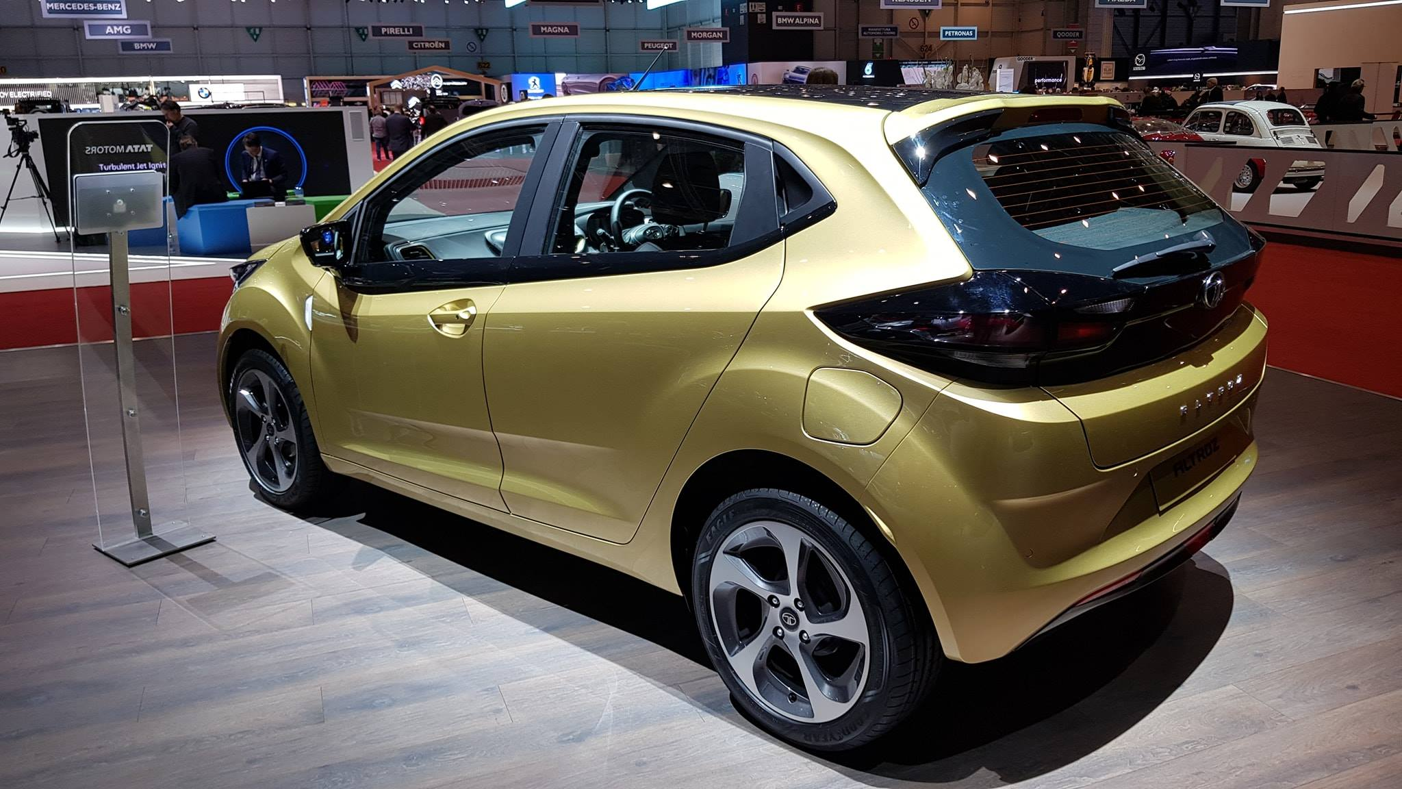 Tata Altroz al salone di Ginevra 2019